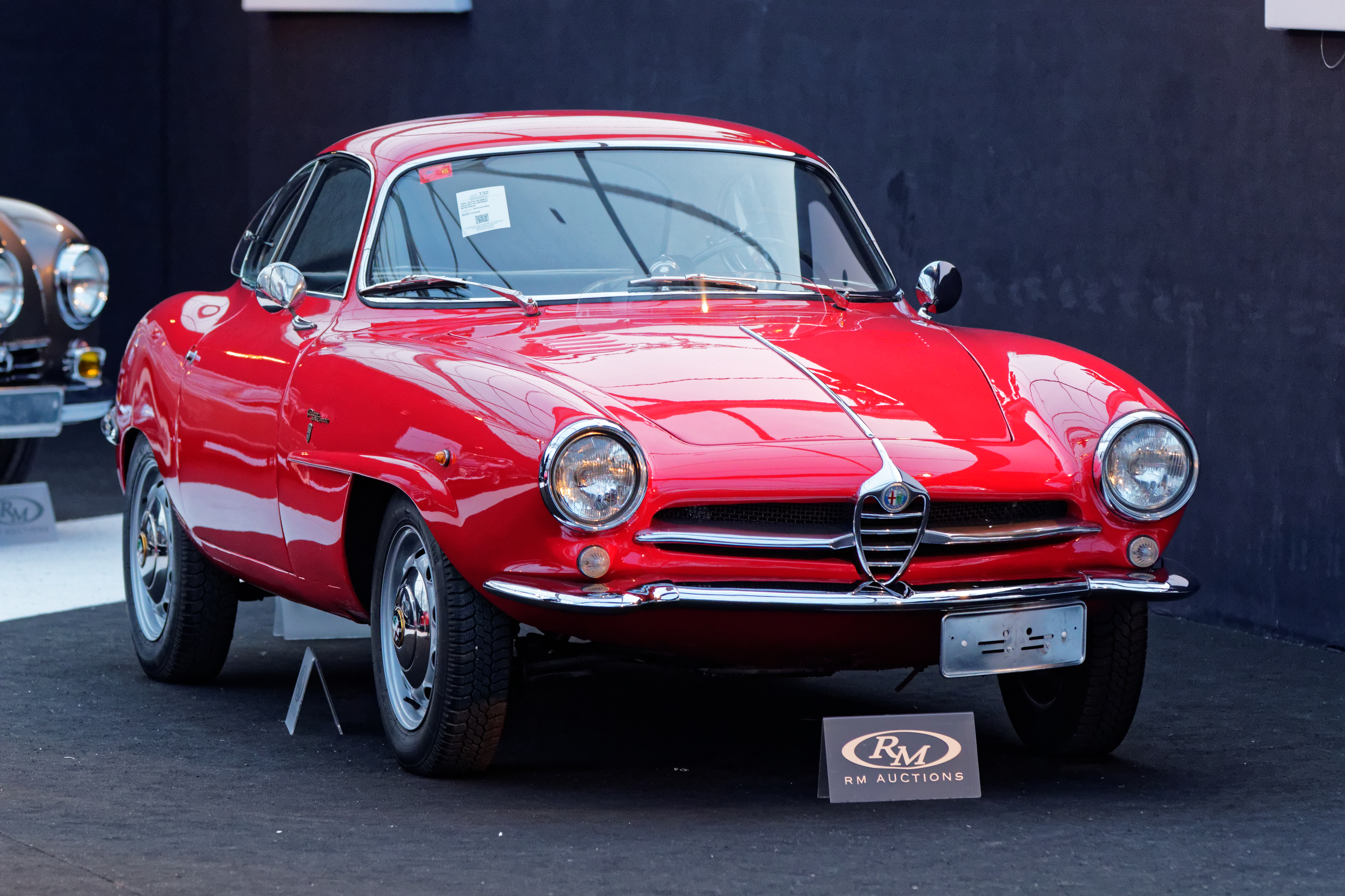 La vente aux enchères RM auctions aux pied des Invalides à Paris le 4 février 2015.